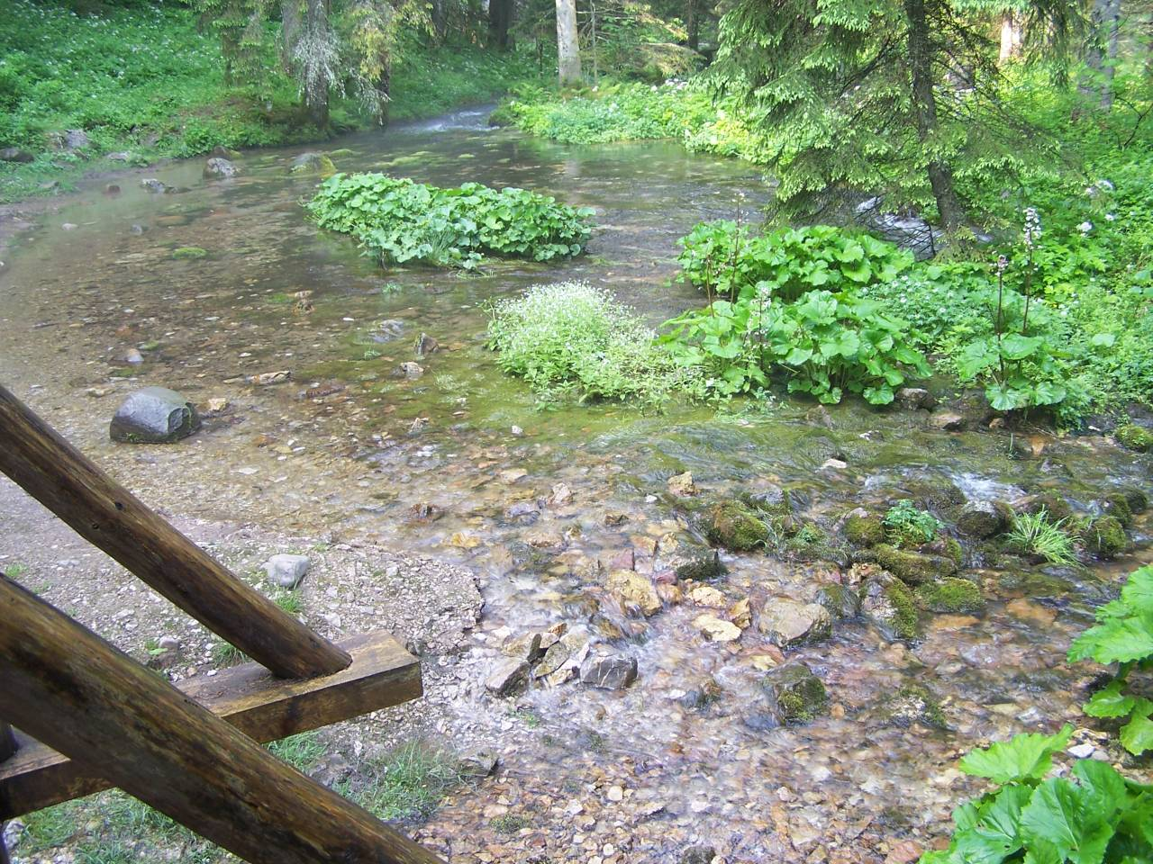 Lodowe Źródło (Dolina Kościeliska)